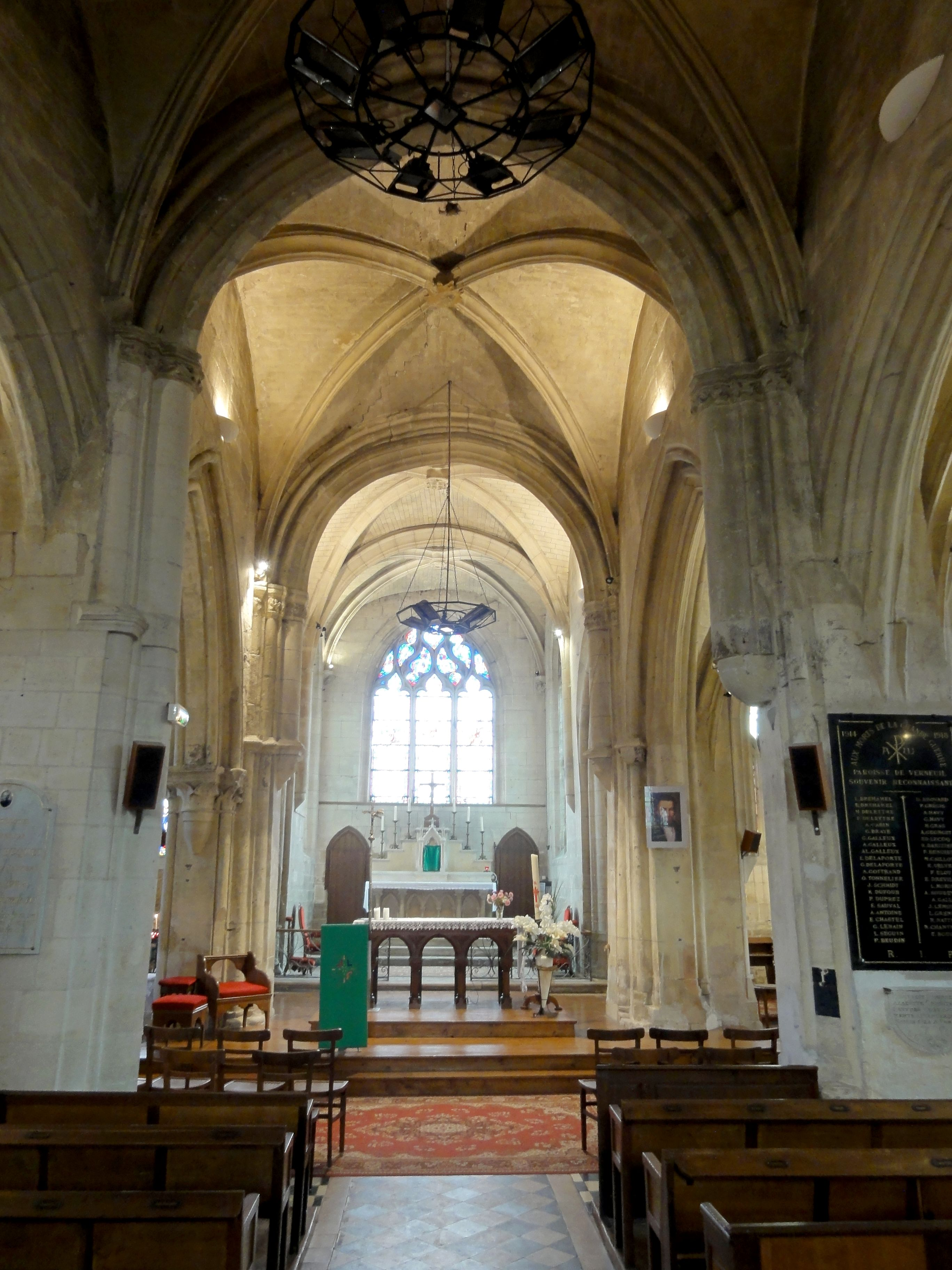 Nef, vue vers l'est.